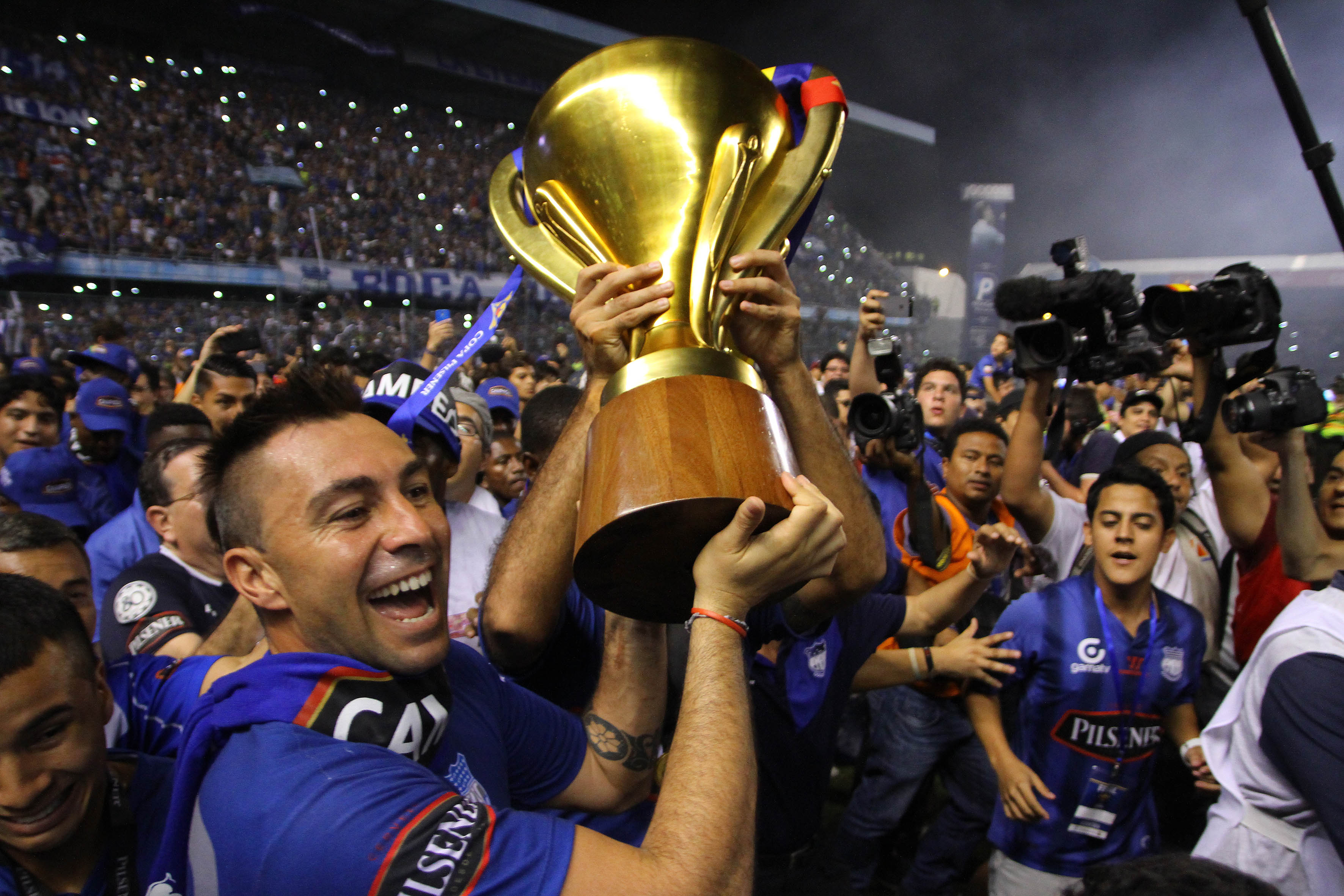 Guayaquil, Ecuador, 21 de diciembre del 2014 (ANDES).-Esteban Dreer levanta la copa y se une al festejo del campeonato de Emelec, luego de ganar 3x0 a Barcelona Foto:César Muñoz/ANDES